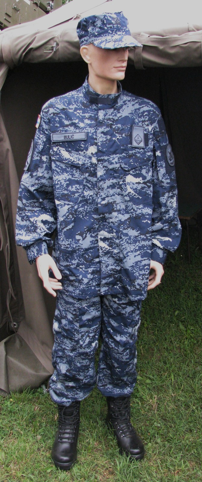 Odora dočasnika Obalne straže Republike Hrvatske